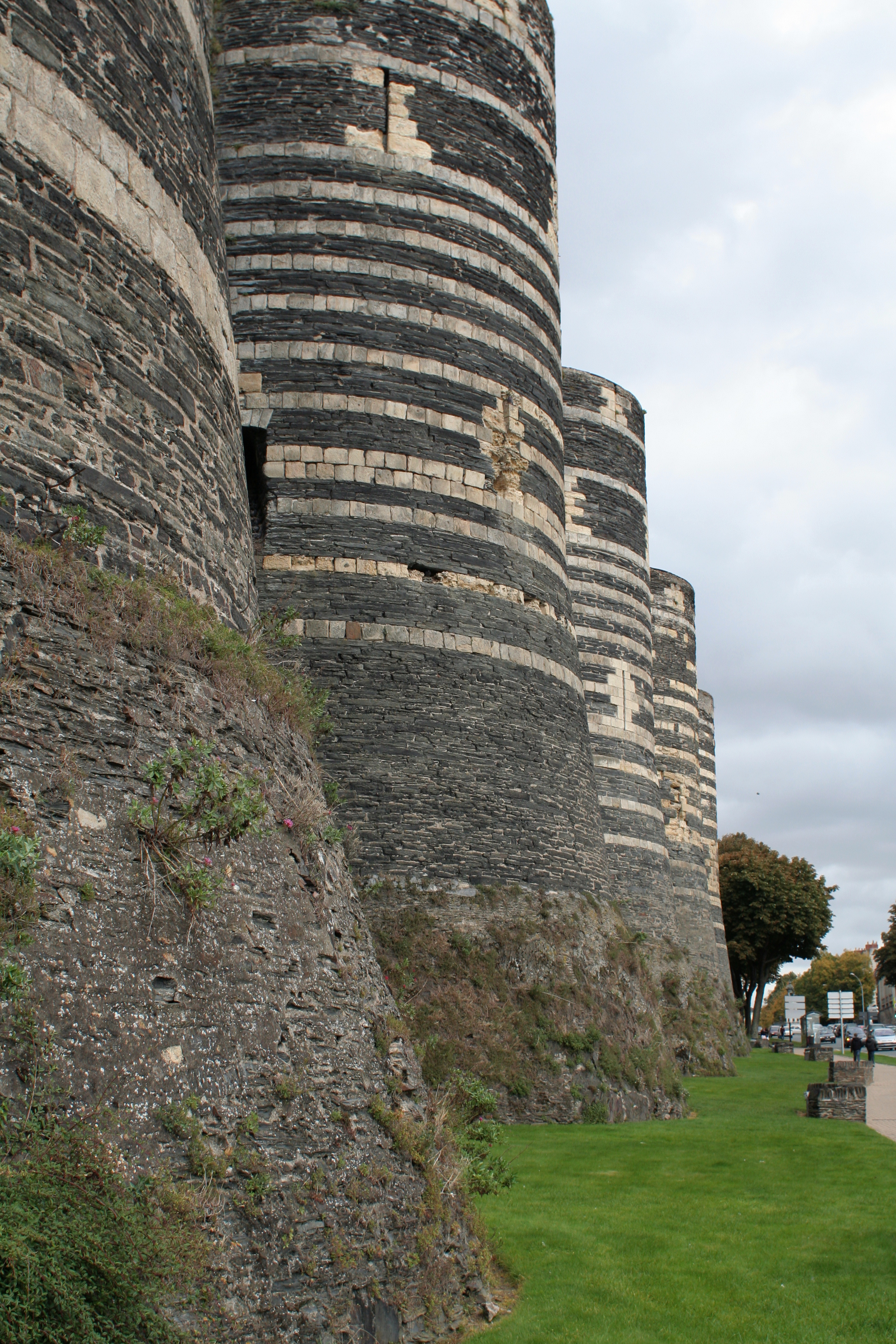 Tours du château d'Angers. It is indexed in the Base Mérimée, a database of architectural heritage maintained by the French Ministry of Culture, under the references IA49000839 and PA00108871 .